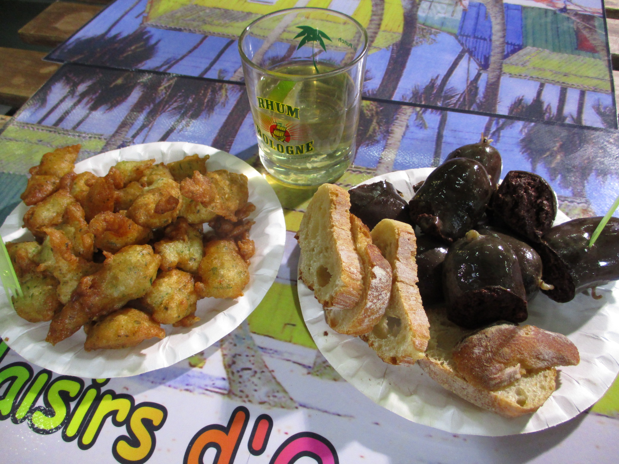 Accras, boudin créole, et Ti-punch